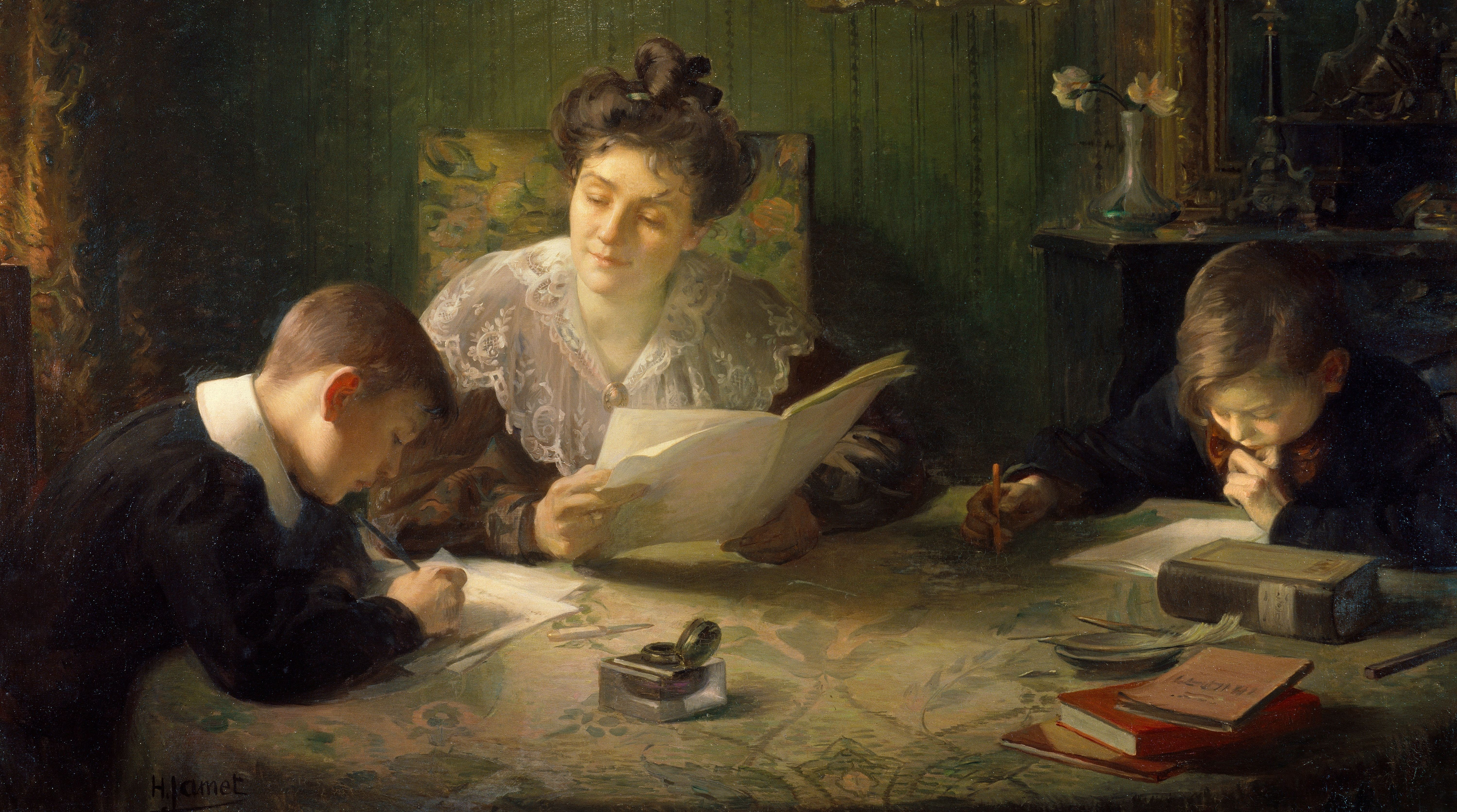 Le devoir de Henri Jamet daté de 1903.